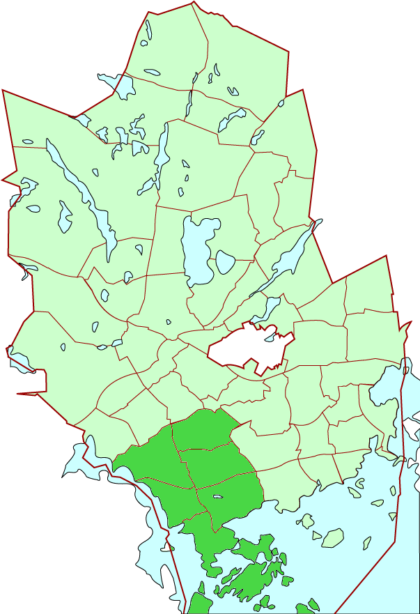 Suur-Espoonlahti/Stor-Esboviken district in Espoo city, Finland